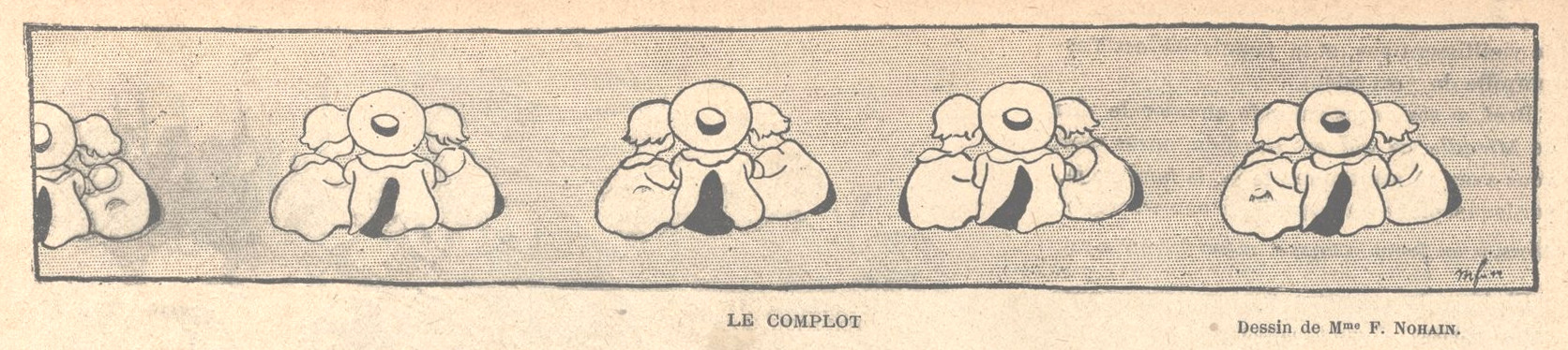 Complot par Marie-Madeleine Franc-Nohain, Le Rire, 26-04-1902.